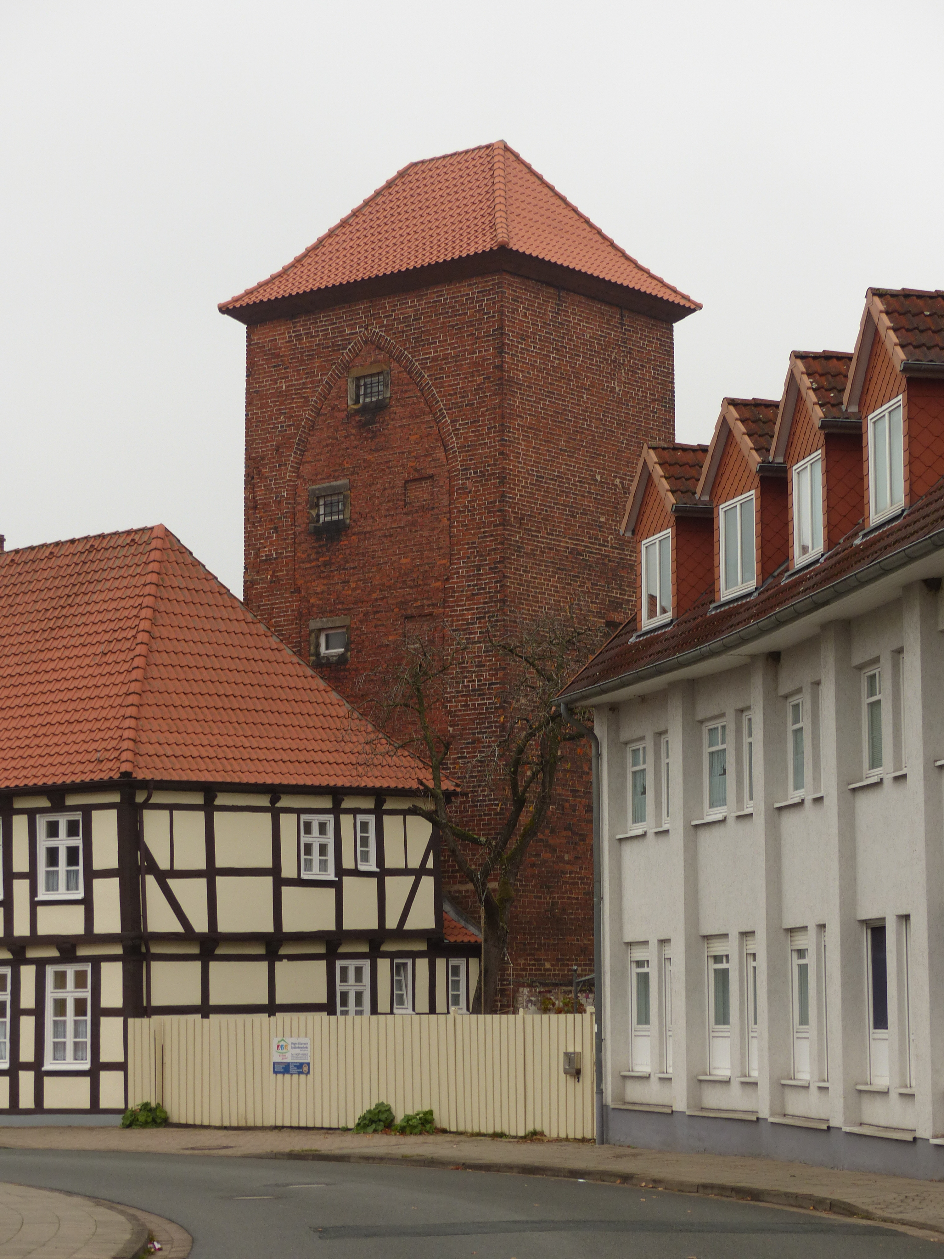 Gotischer Backsteinturm der (ehemaligen) Stadtmauer in Verden (Aller), auch ehmaliges Gefängnis